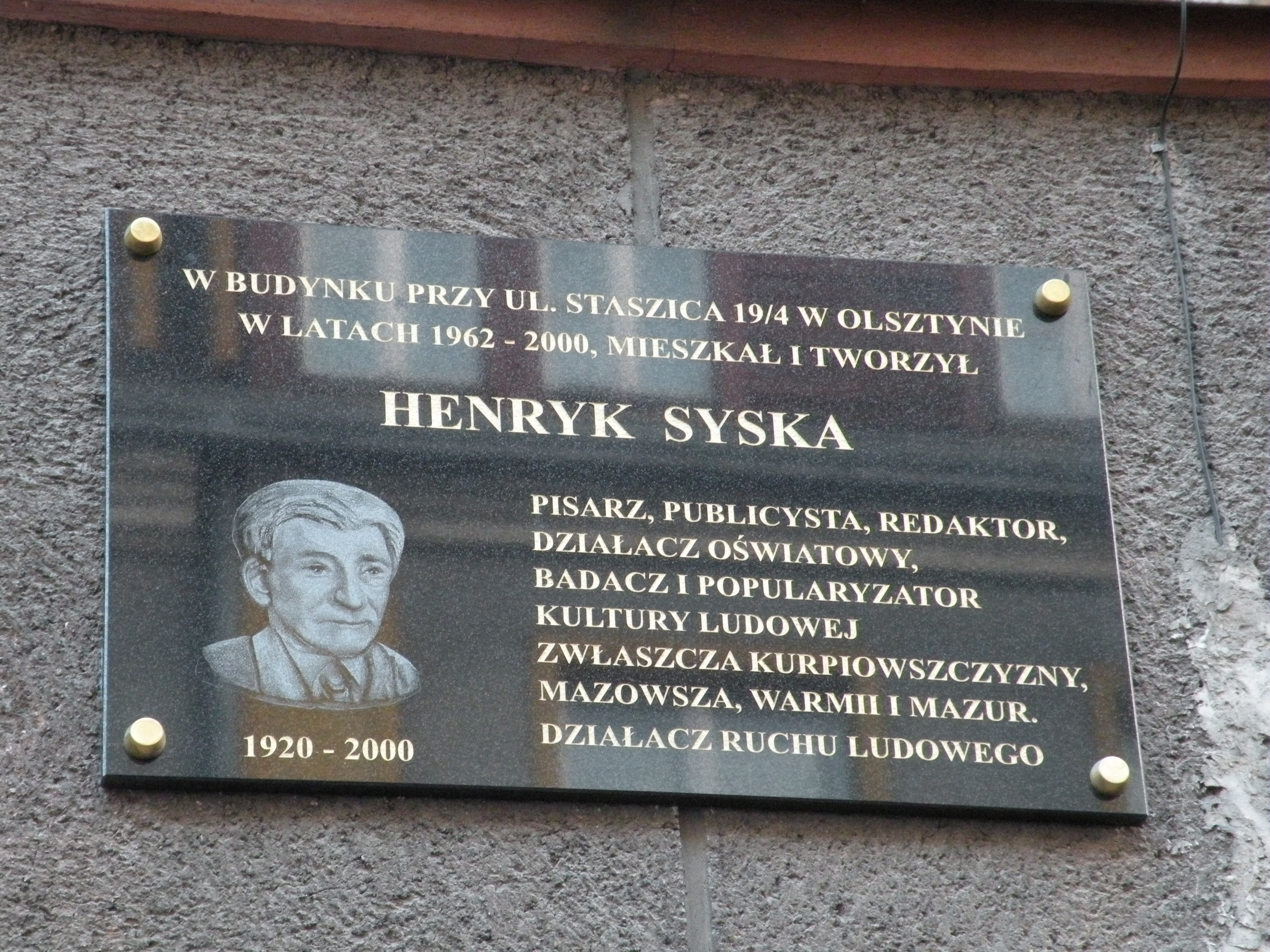 Tablica pamiątkowa, umieszczona w 2010 r., Olsztyn, Stare Miasto, ul Staszica 19, Henryk Syska